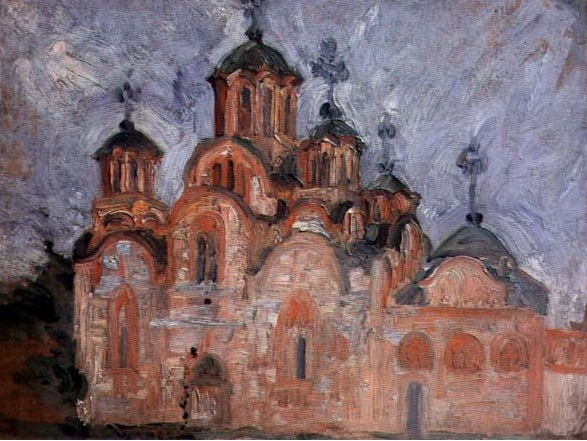 Надежда Петровић: Грачаница (1913), Уметничка галерија "Надежда Петровић" Чачак